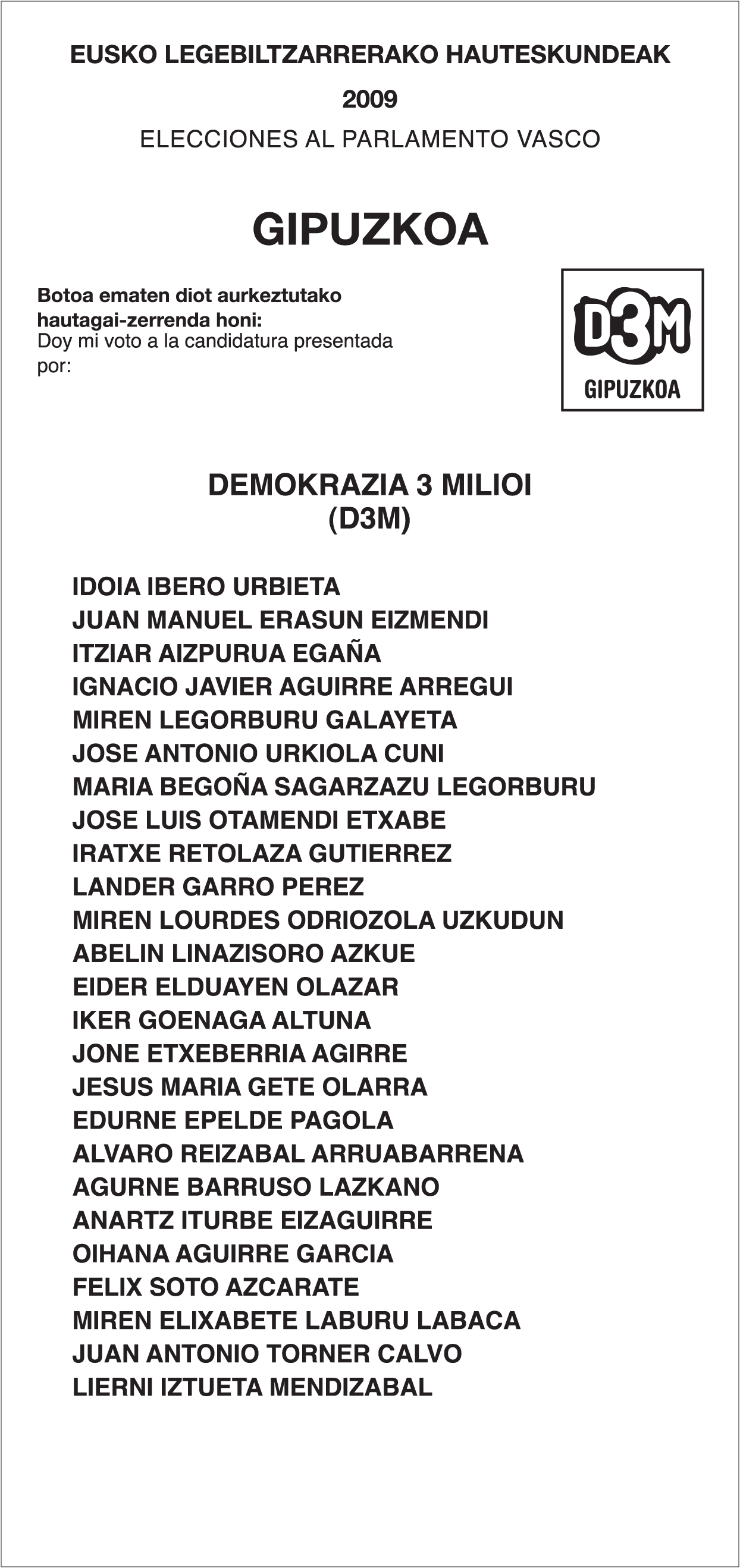 D3Mren bozka-papera Gipuzkoan